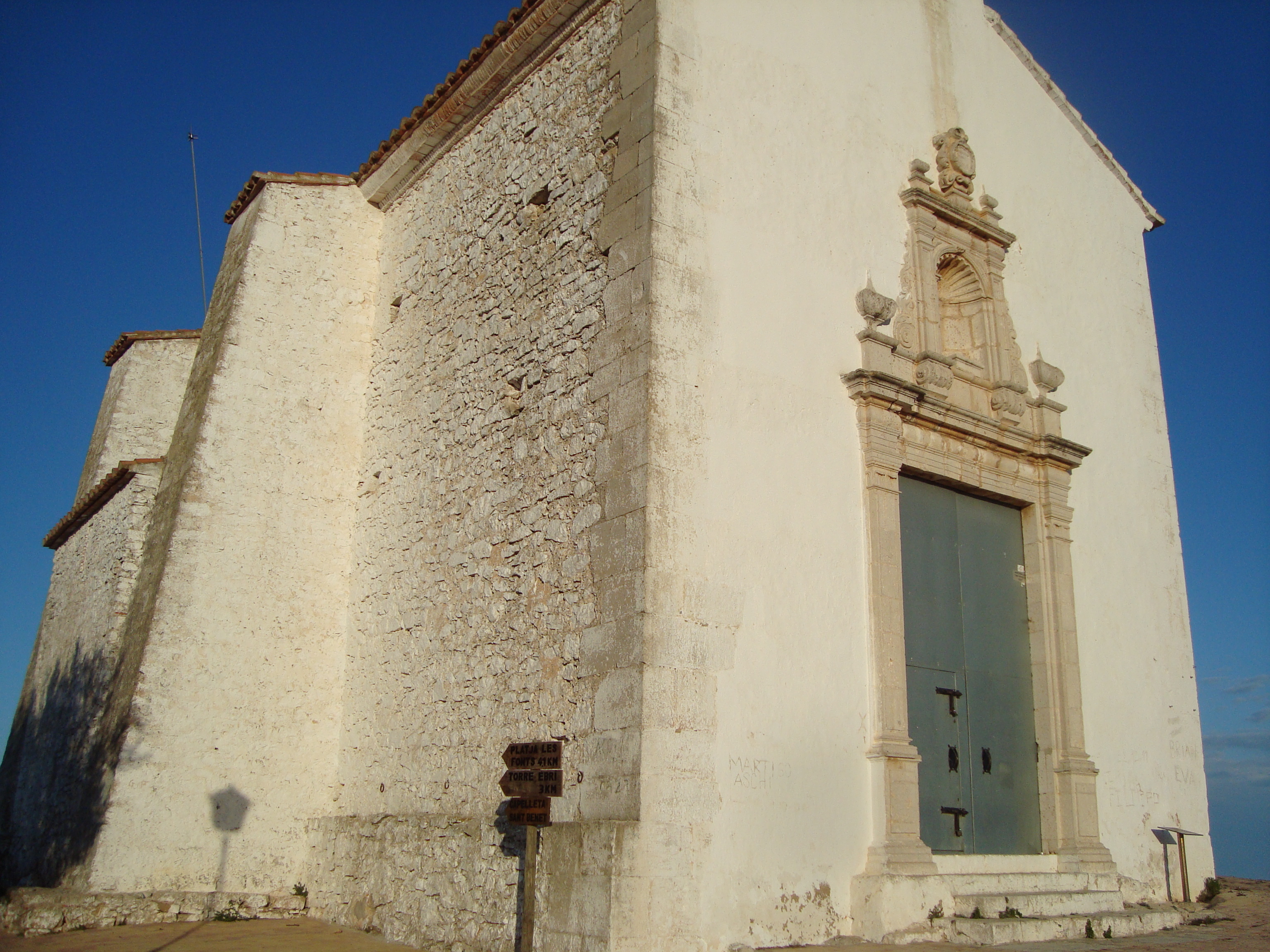 Ermita de Santa Lucía y San Benito, Alcalà de Xivert